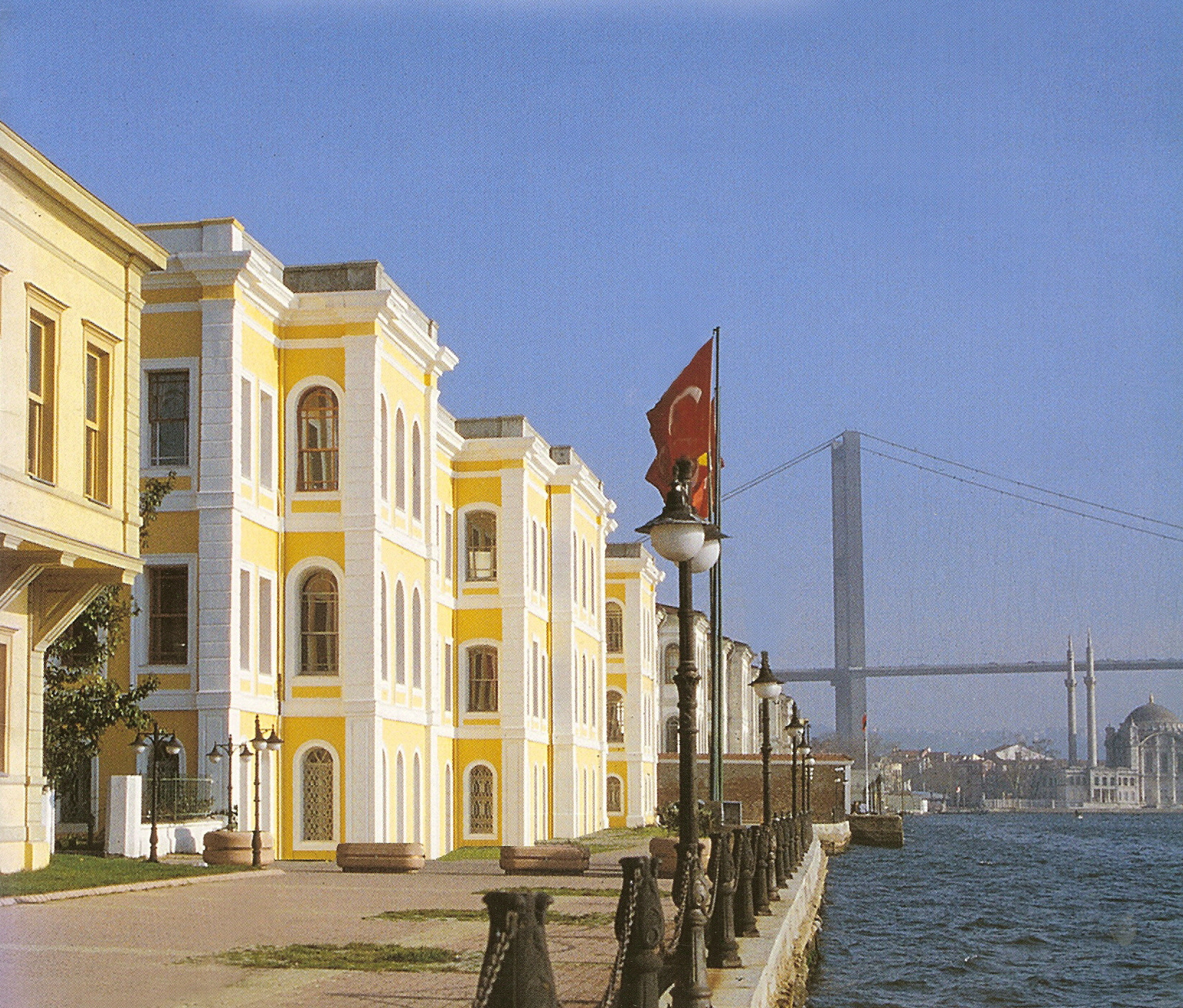 Photo de la façade de l'Uni. Galatasaray (Istanbul)